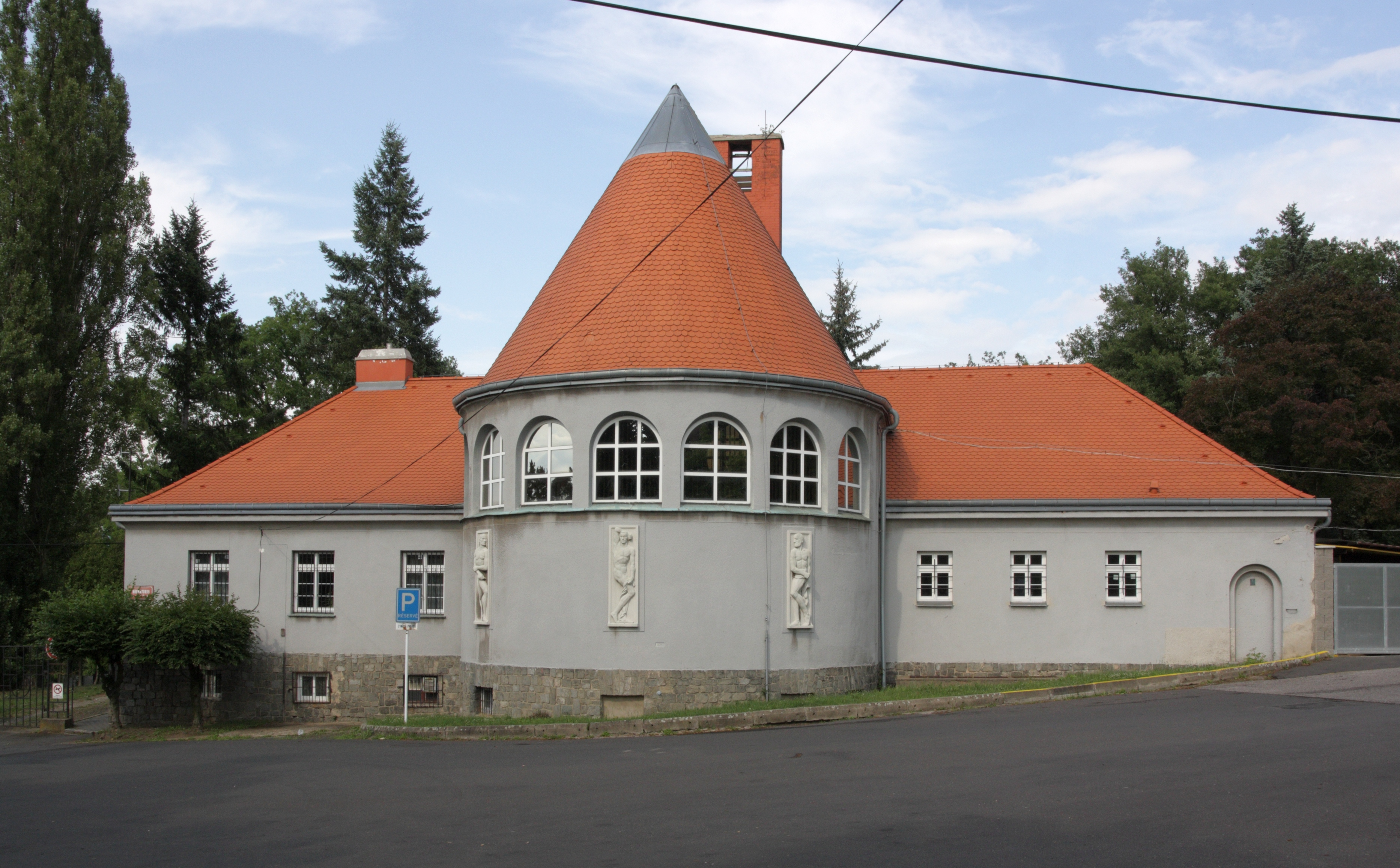 Ústí na d Labem, Střekov - staré krematorium